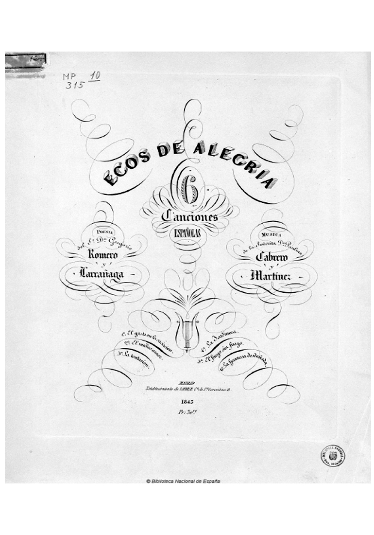 Portada del ciclo de canciones Ecos de alegría, composición de Paulina Cabrero y Martínez de Ahumada y poesía de Gregorio Romero de Larrañaga, publicado en 1843 por Establecimiento de Lodre, Madrid (Cª de Sn. Jerónimo, 13)